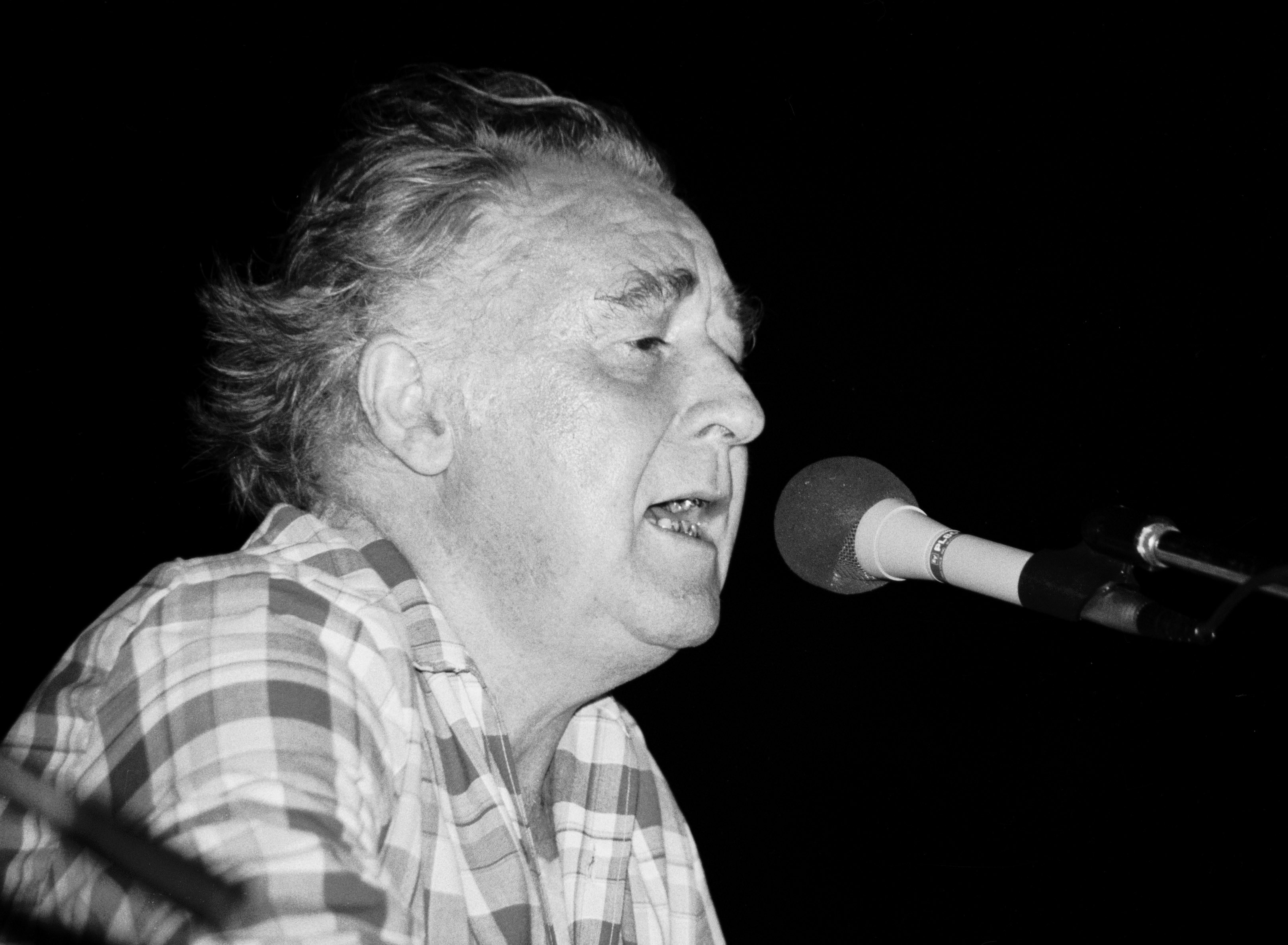 Le chanteur breton Youenn Gwernig à Plouvorn (Bretagne, France) le 7 août 1982.